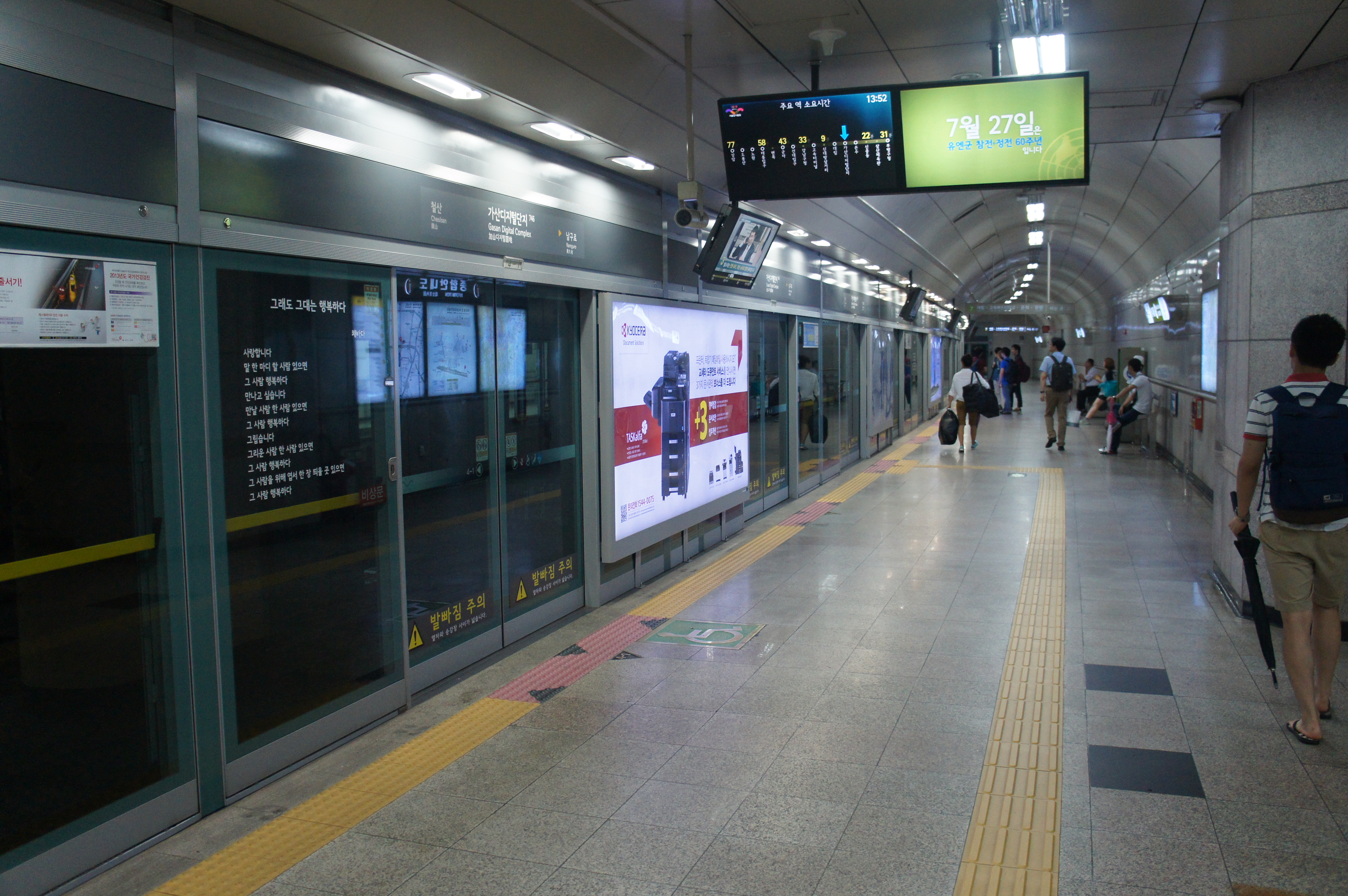 7호선 가산디지털단지역 승강장